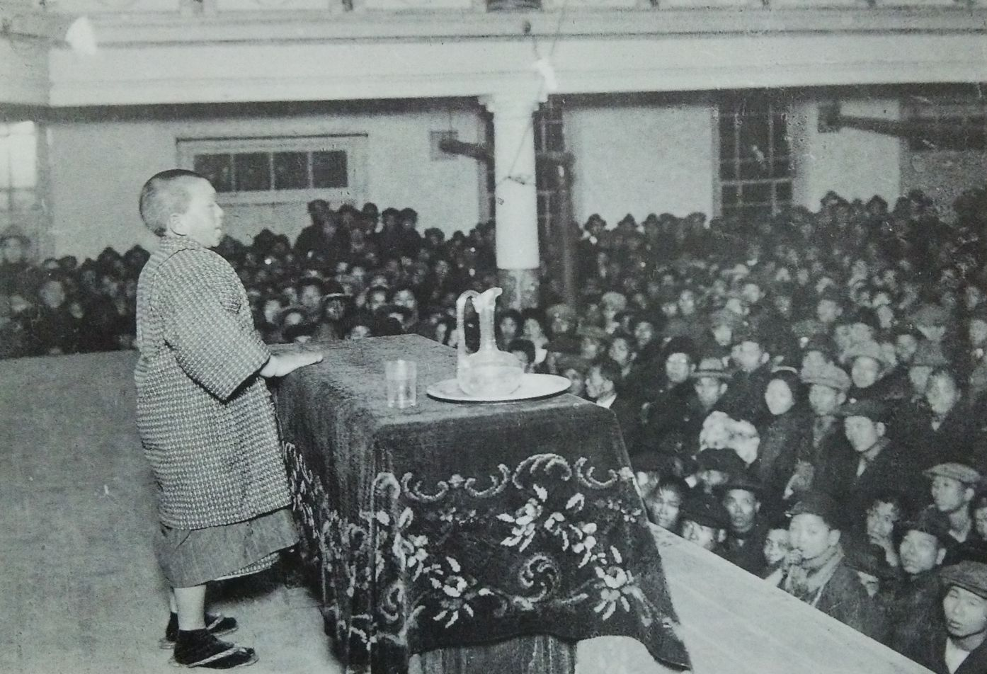 全国水平社青年同盟西浜支部での演説会での山田孝野次郎（天王寺公会堂にて）